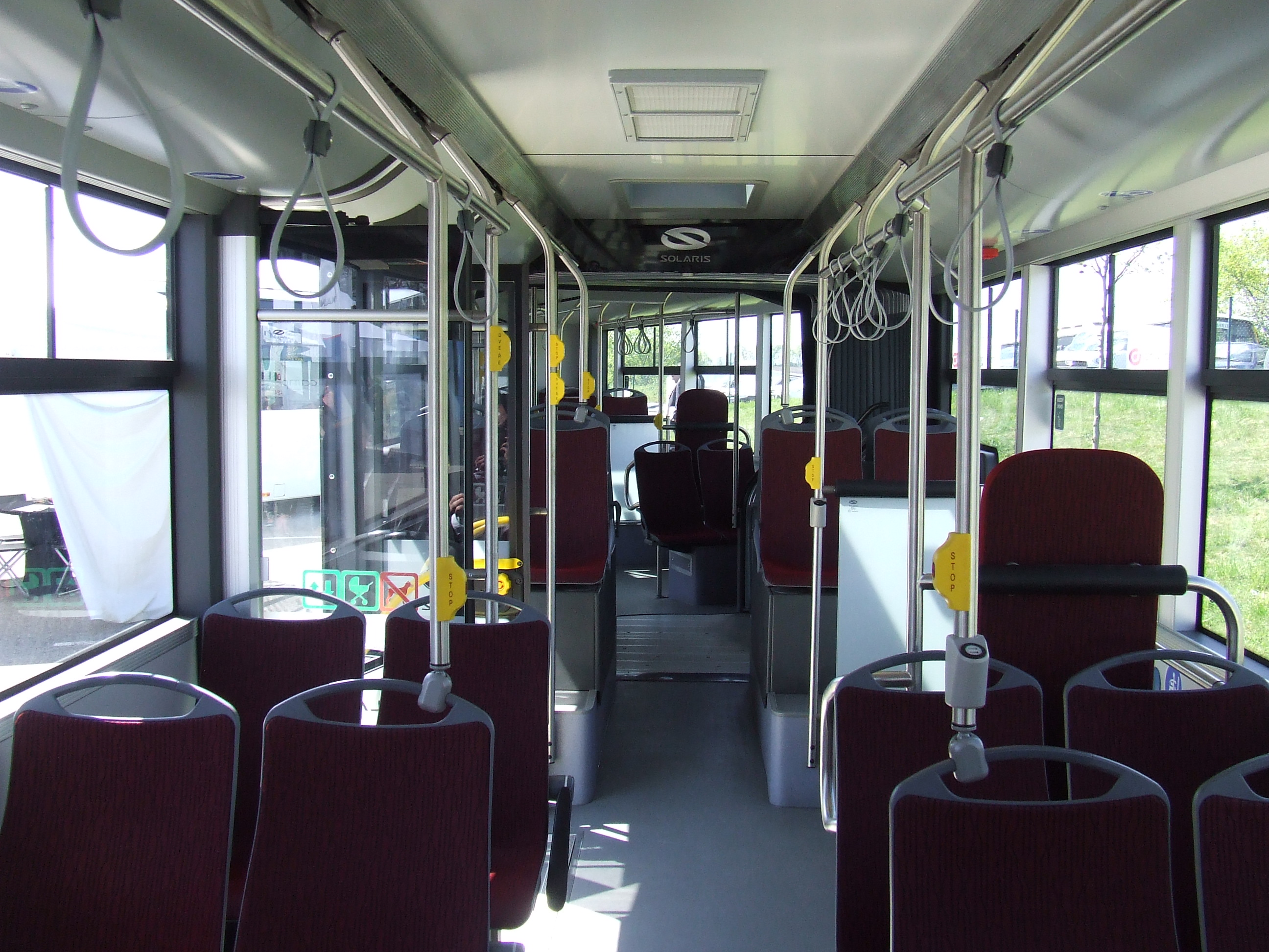 Busexpo 2016, Zsámbék